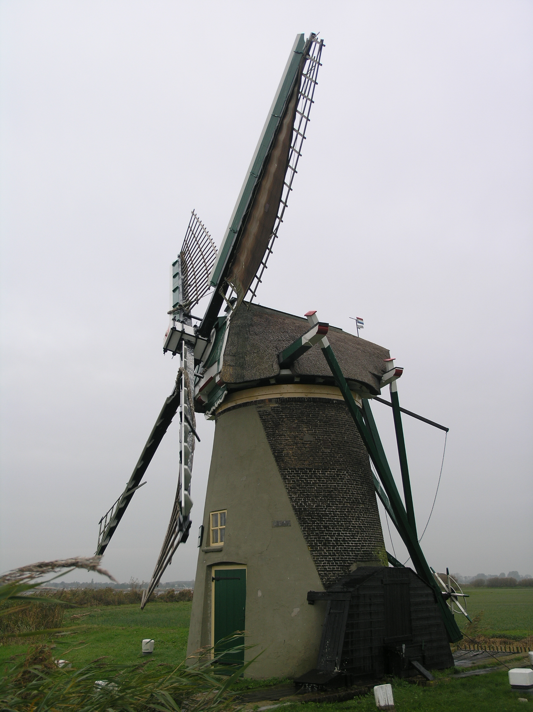 Foto van de Lakermolen bij Warmond